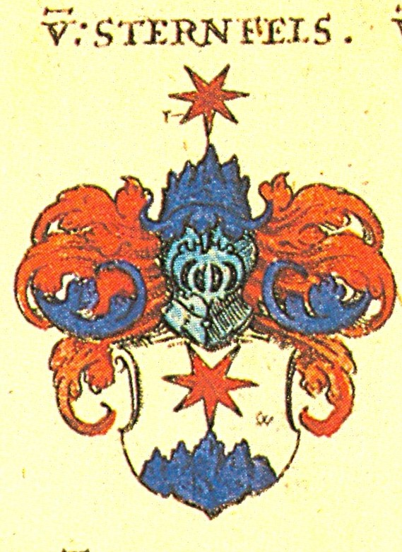 Ritterschaft und Adel in Franken von Sternfels